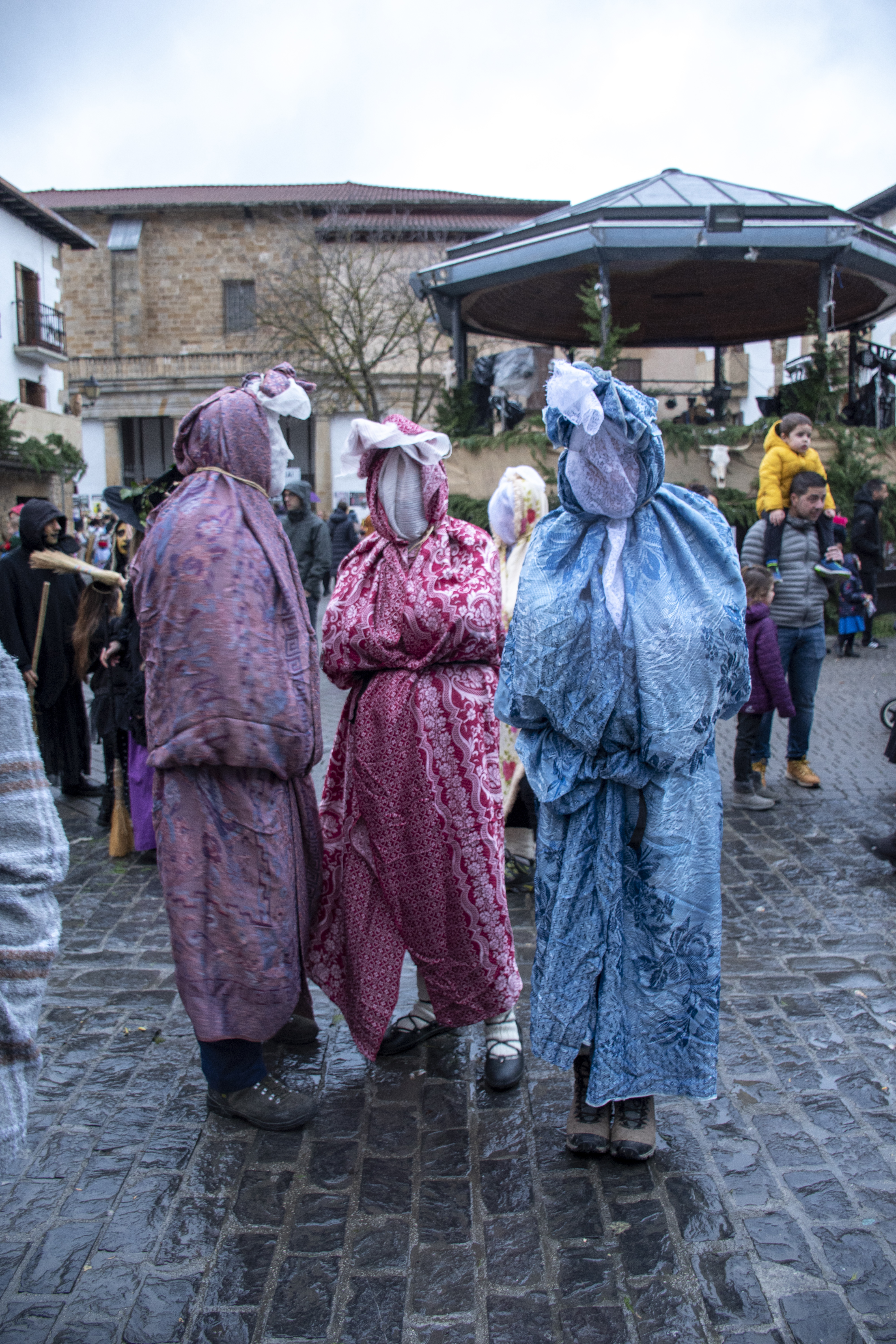 Altsasuko inauteriak 2020 Irudi hau Wikibizi kanpainaren baitan igo da, Euskal Wikilarien Kultura Elkarteak 2020an deitutako argazki lehiaketa hirukoitza. Helburua, Euskal Herria hobeto ezagutzen laguntzea da.Lagundu zuk ere irudi hau dagokion artikuluetan txertatzen.